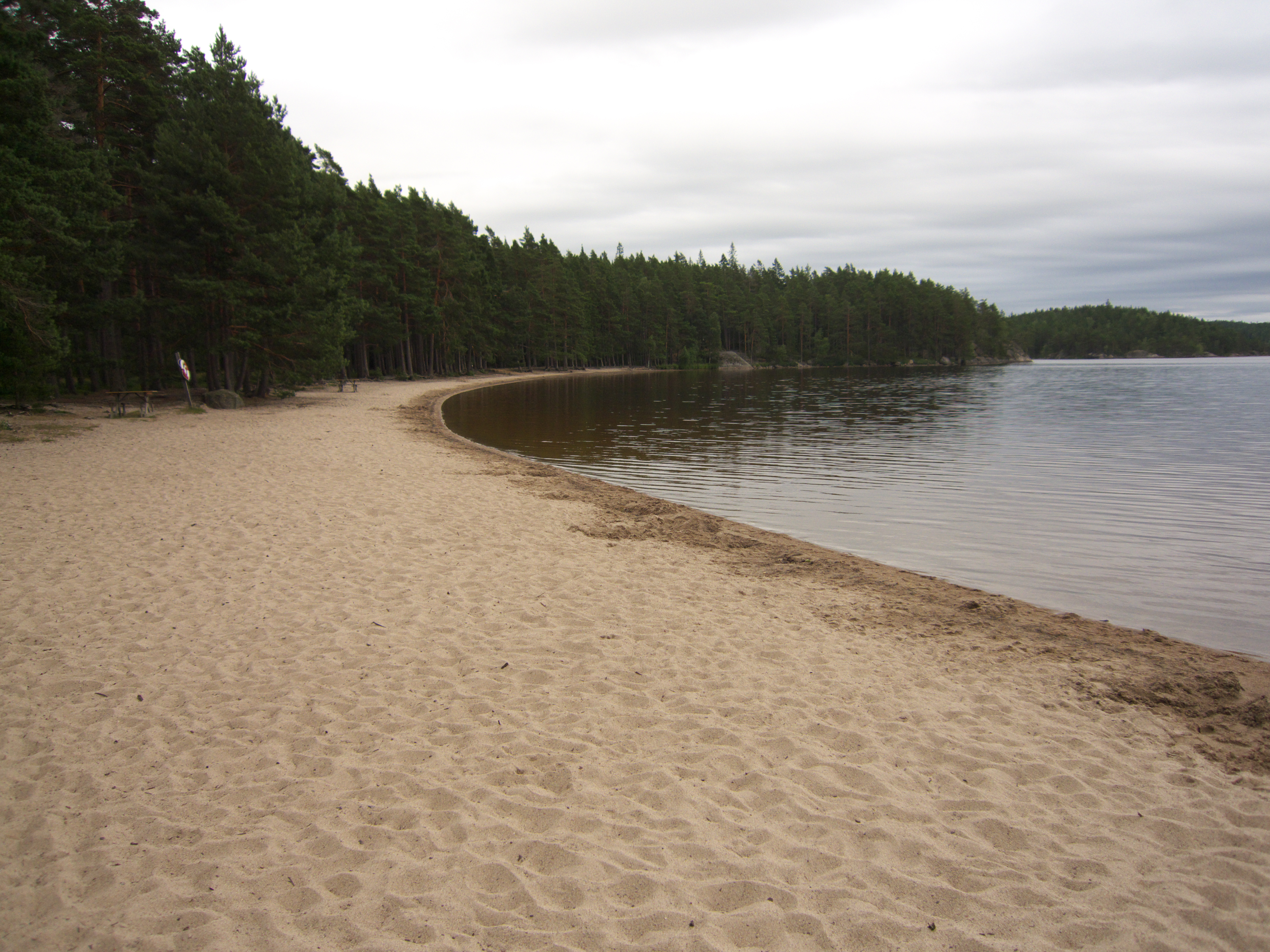 Vitsand vid sjön Stora Trehörningen, Tivedens nationalpark